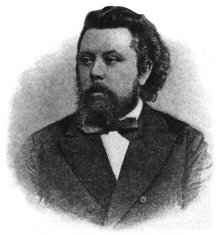 Modest Mussorgsky, 1839-1881